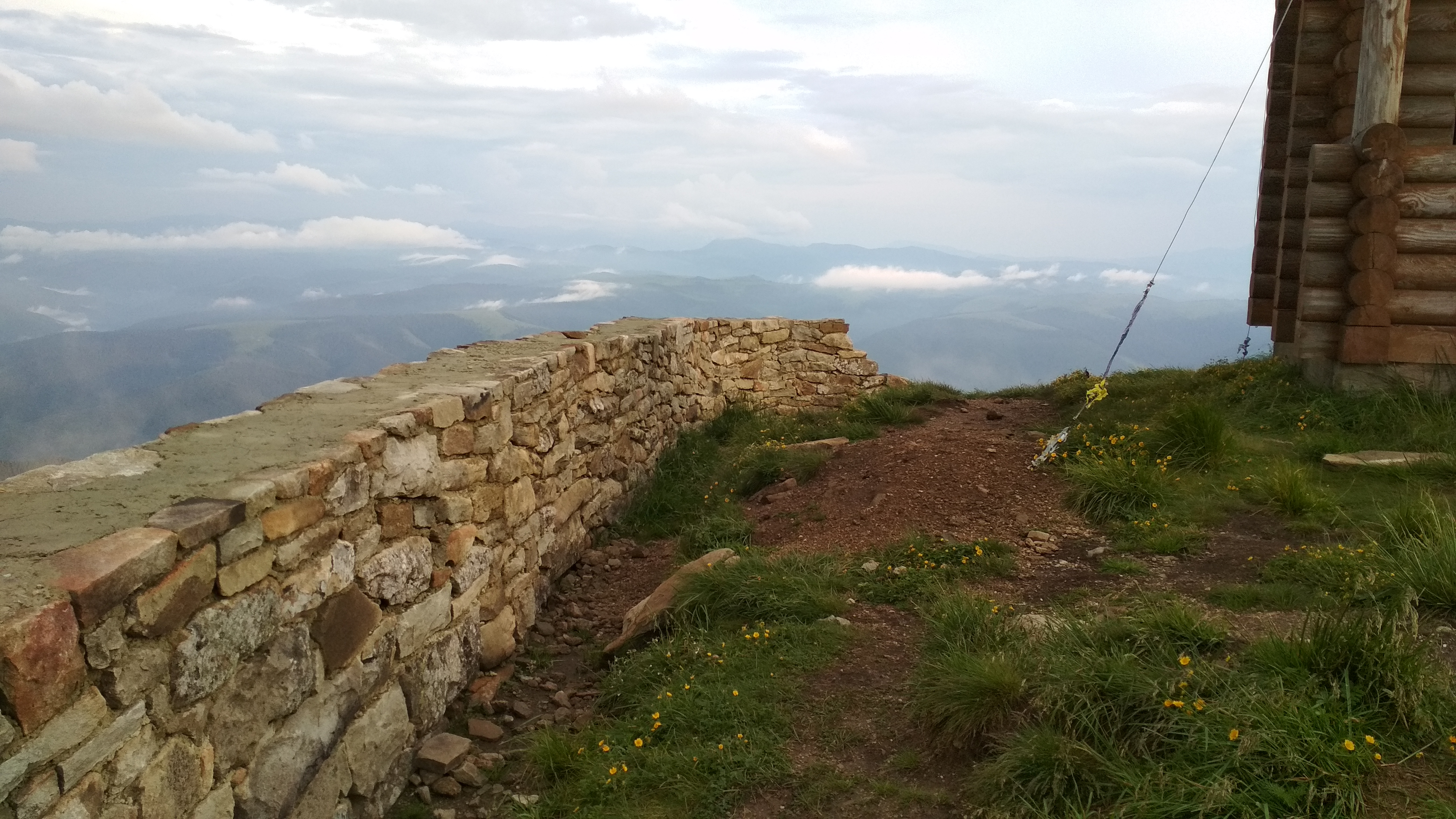 стан муру на червень 2018 р.